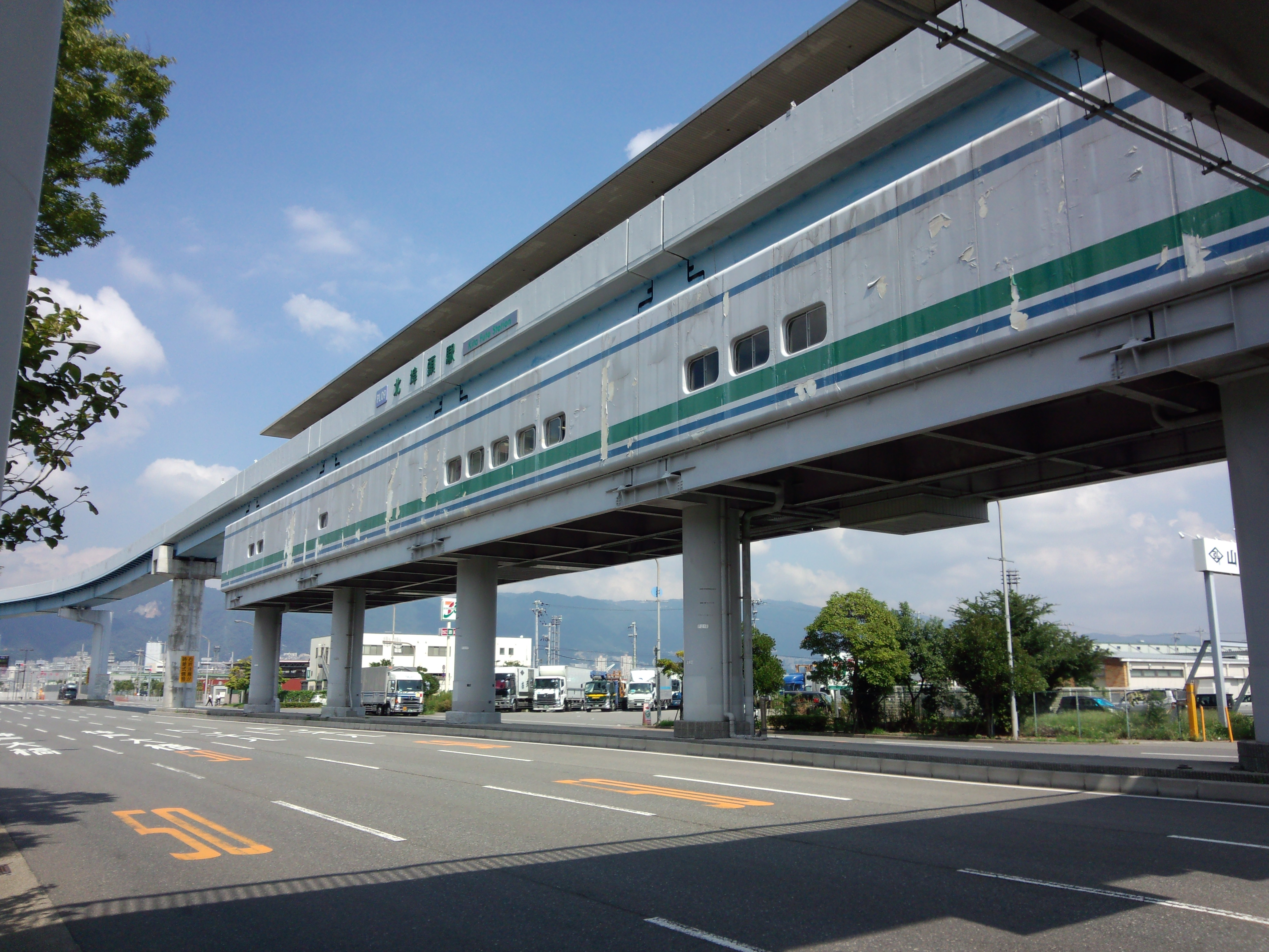 神戸新交通 北埠頭駅